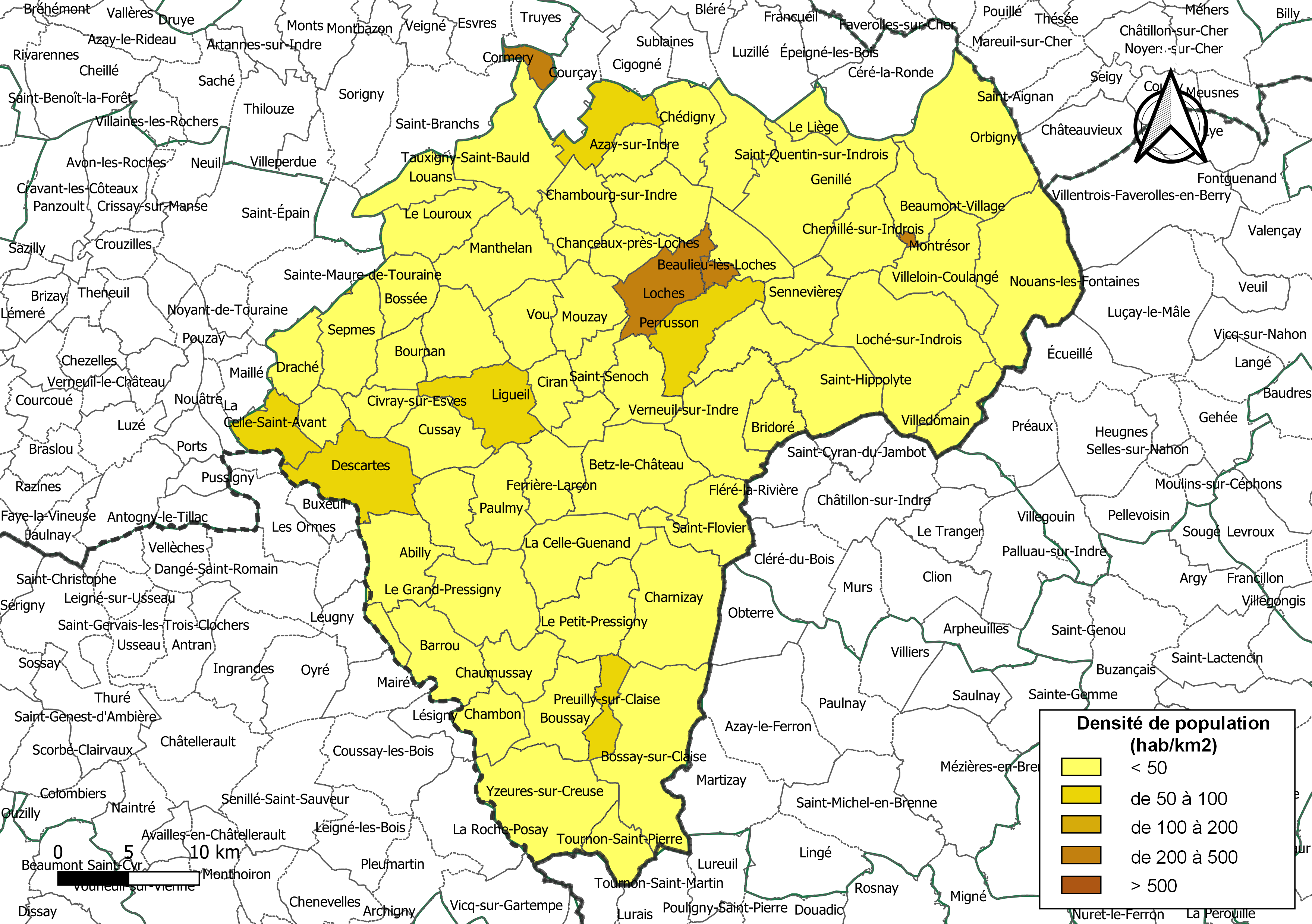 Carte des densités de population (millésimée 2016) des communes de la communauté de communes la Communauté de communes Loches Sud Touraine, département d'Indre-et-Loire, France. Composition au 1er janvier 2019.